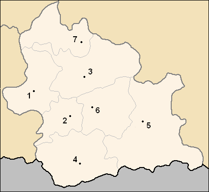 Sujet : carte des obchtini (municipalités) de l'oblast de Kardjali, en Bulgarie Auteurs : Потребител:Ljubo (Любомир Таушанов = Lyoubomir Taouchanov), pour la version originale en bulgare, Utilisateur:Hégésippe Cormier, pour la translittération française Source : Картинка:Kardzali Oblast map.PNG (22 mai 2005) Licence